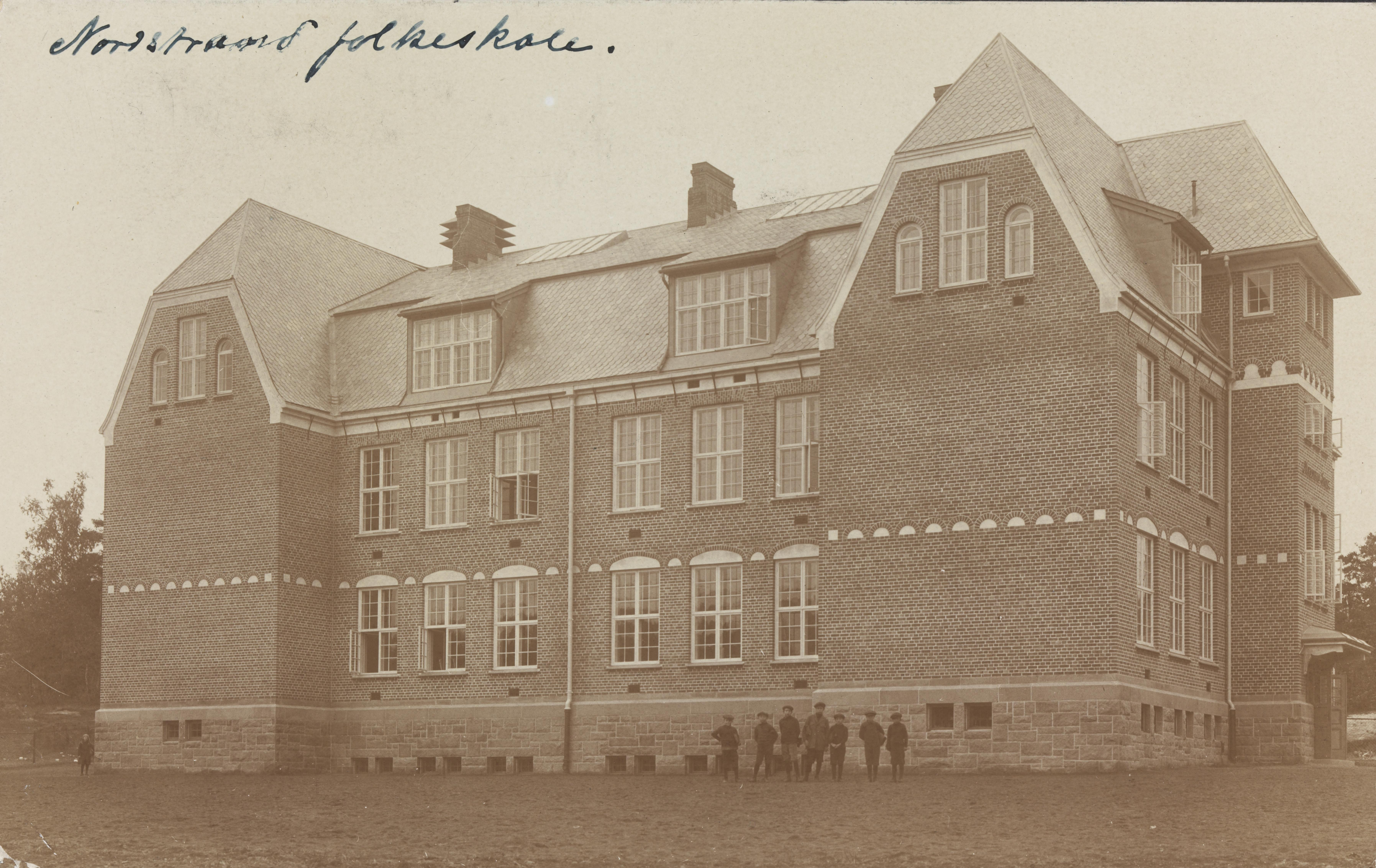 Bildet er hentet fra Nasjonalbibliotekets bildesamling. Anmerkninger til bildet var: Tittel fra påskrift på forsiden av komponent 1 Nordstrand,Nordstrand skole, Oslo, Oslo